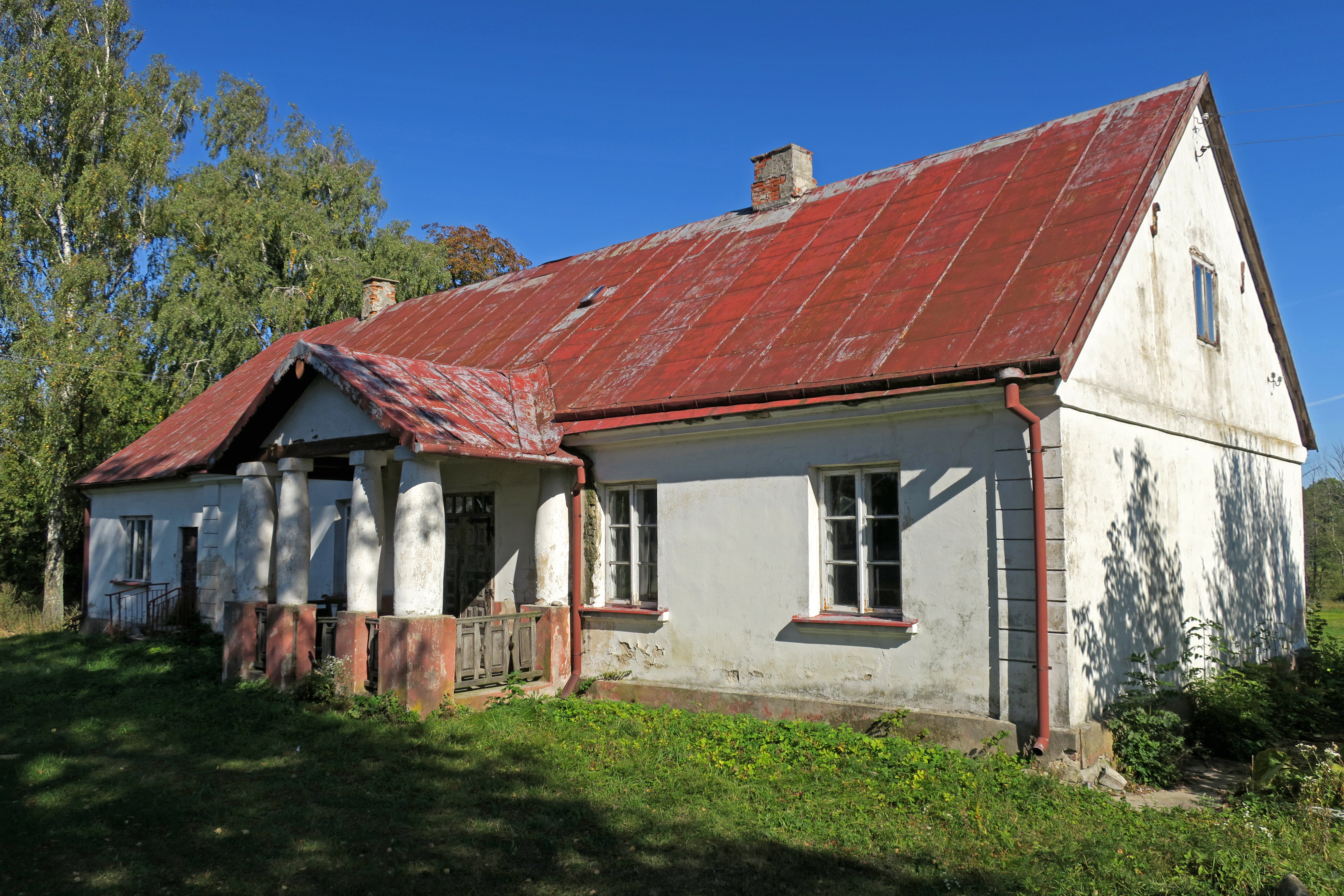 Zabytkowa plebania w Grabowie (powiat kolneński)